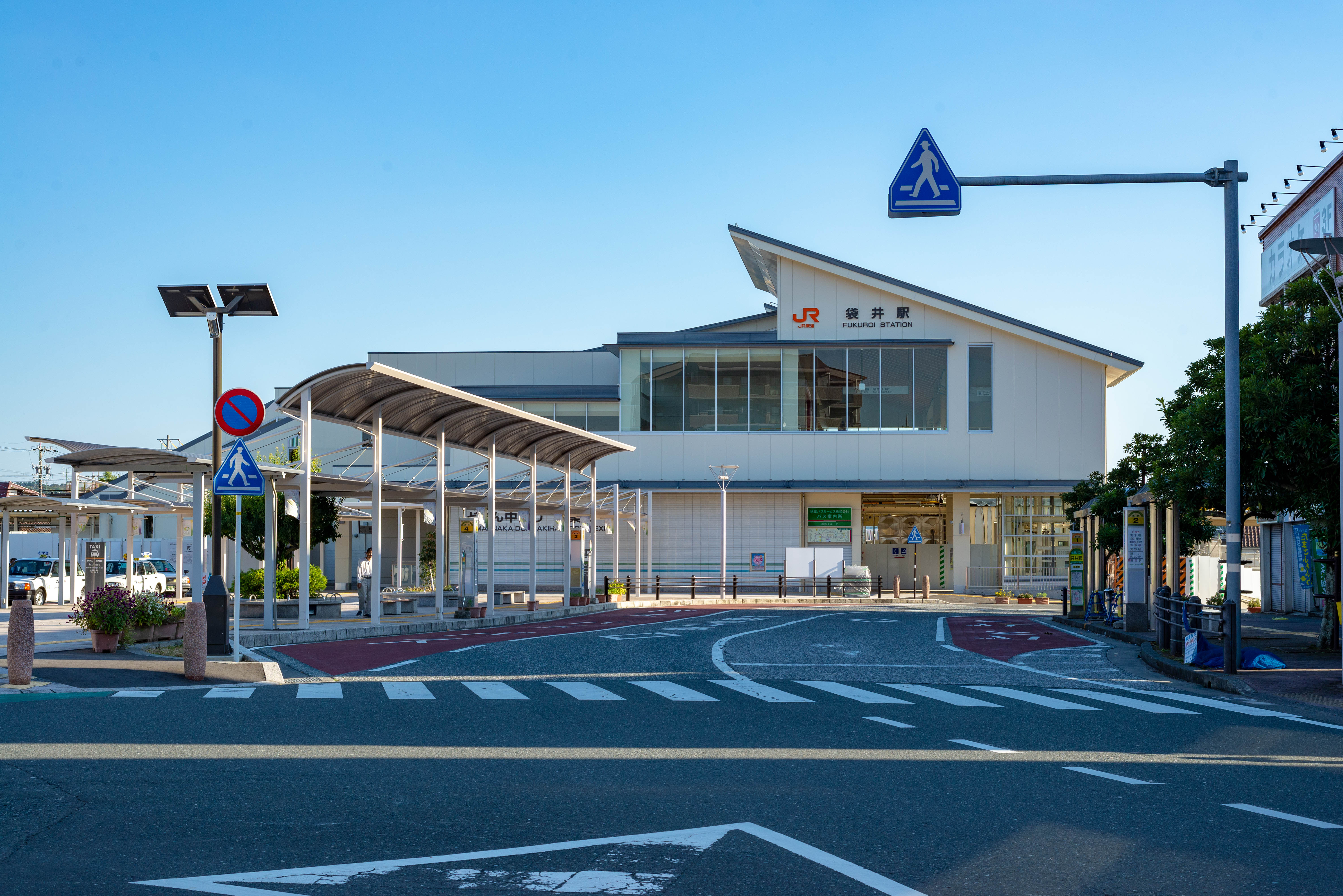 東海旅客鉄道株式会社東海道本線袋井駅駅舎